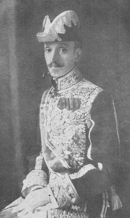 Сергей Николаевич Свербеев, русский дипломат, посол в Германии.